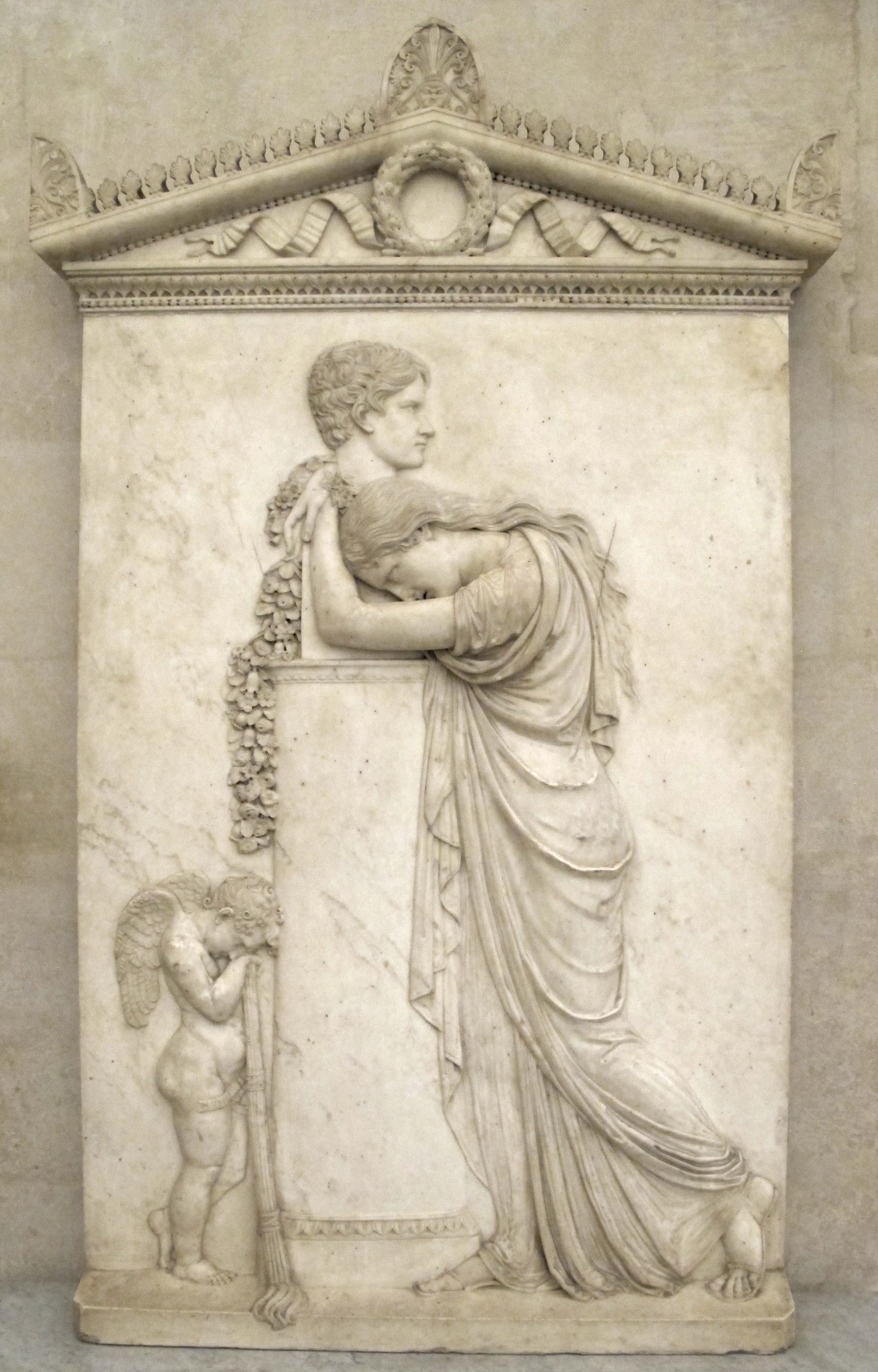 scultura italiana al Louvre